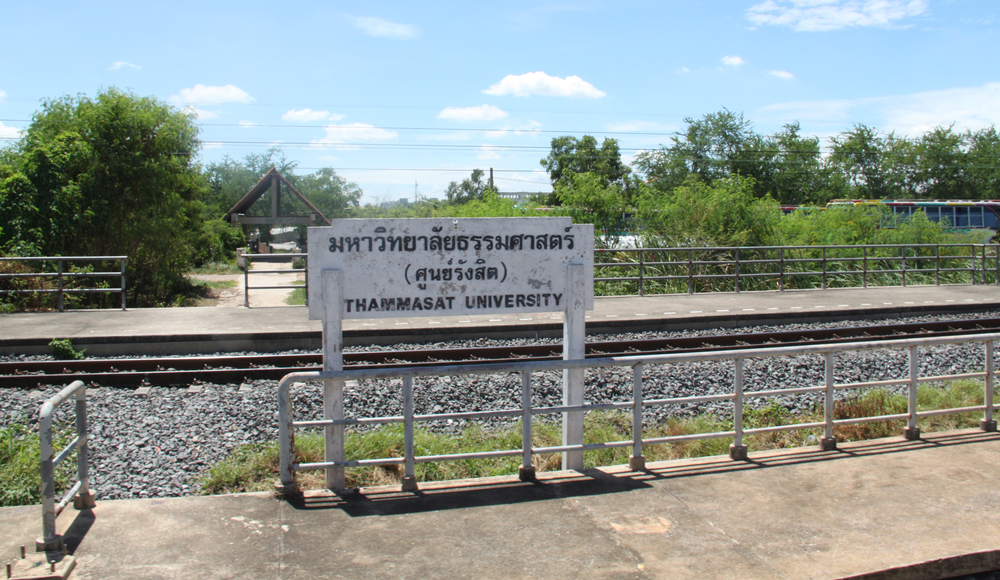 Thammasat University railway station